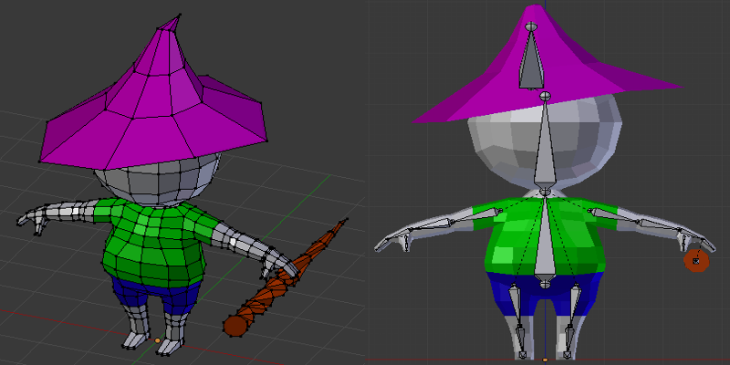 Modelado y Rigging del personaje en Blender